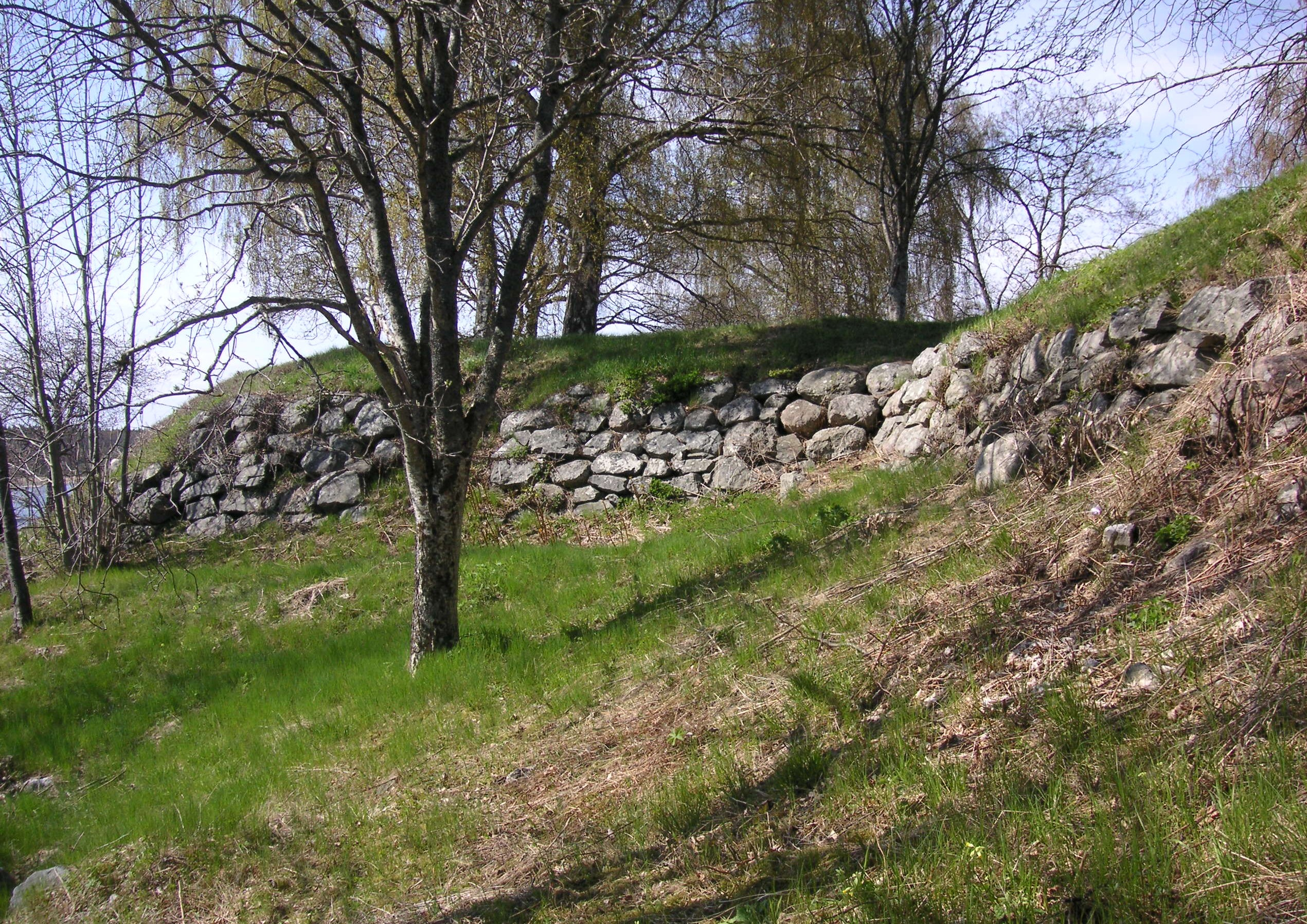 Nässkansen i Botkyrka kommun